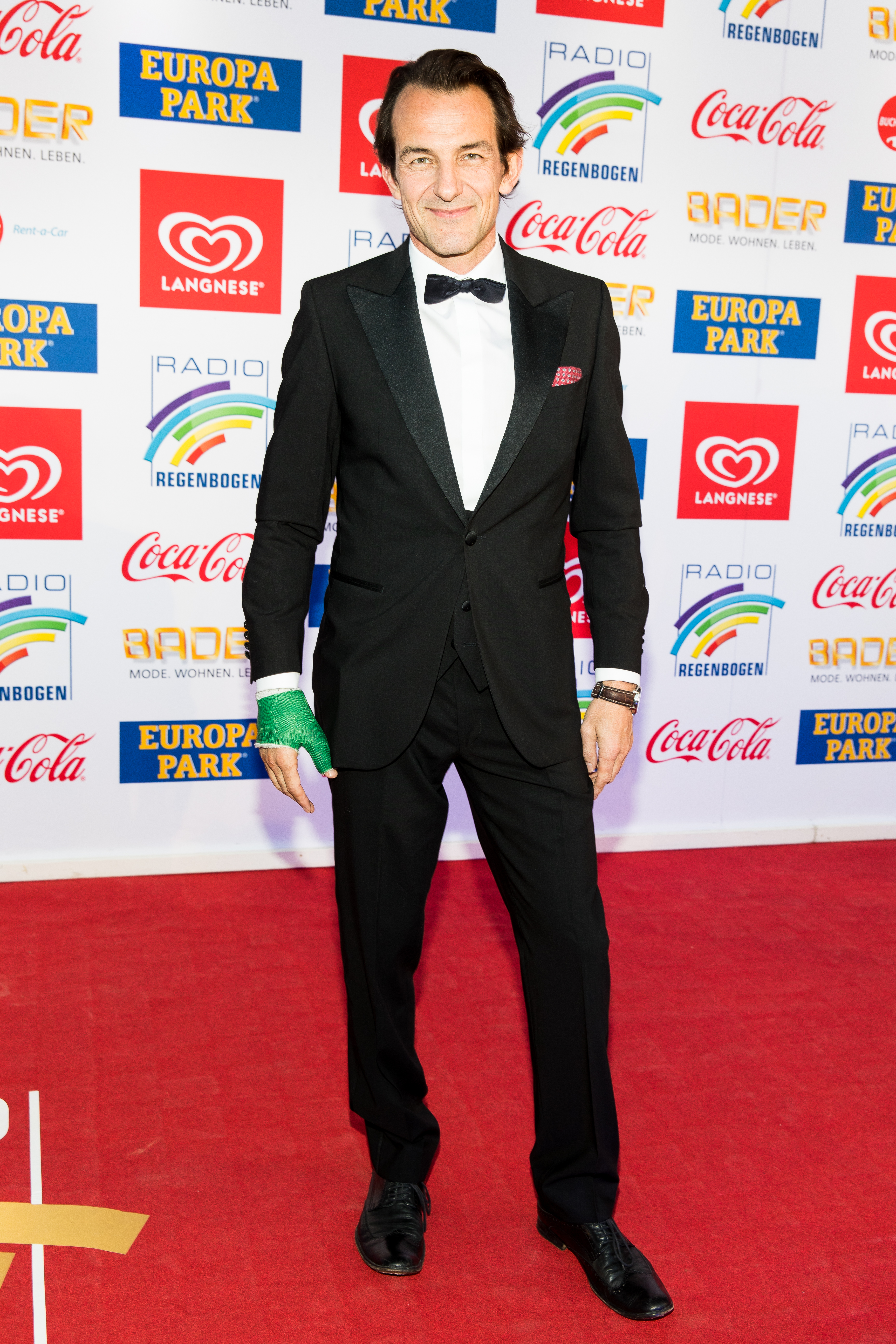 during Radio Regenbogen Award 2017 at Europapark, Rust, Baden-Württemberg, Germany on 2017-04-07, Photo: Sven Mandel